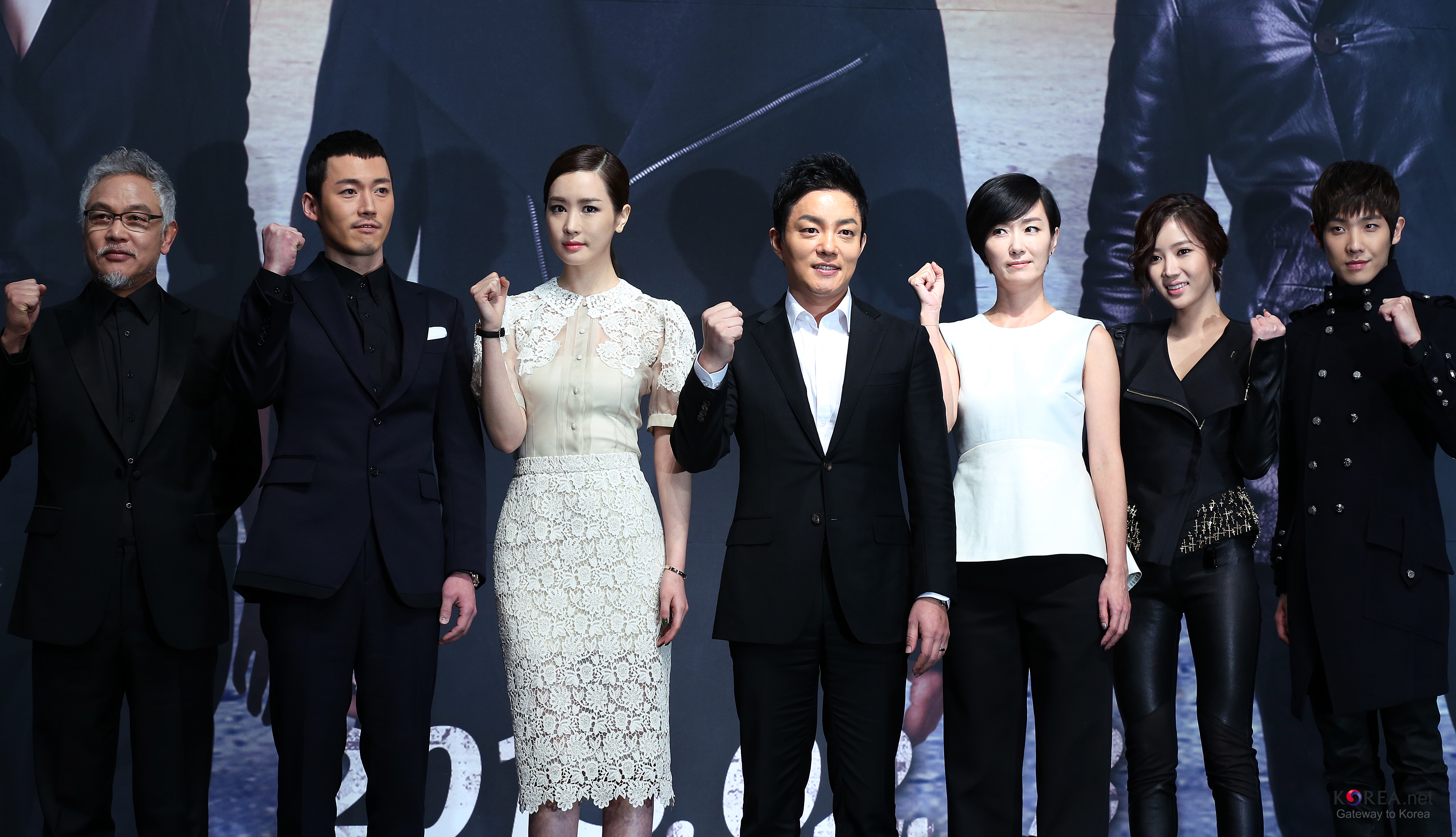 K-Drama 'IRIS 2' Press Conference From left Kim Young-chul, Jang Hyuk, Lee Da-hae , Lee Bum-soo, Oh Youn-soo, Im Soo-Hyang, Lee Joon Lotte Hotel, Seoul 2013.02.07. Ministry of Culture, Sports and Tourism Korean Culture and Information Service Jeon Han Articles about IRIS2 Korean blockbuster drama Iris returns (日本語) 韓国ドラマ、2013年のキーワードは“アクション” ブロックバスタードラマ「アイリス(IRIS)２」、いよいよ放映 (中文) 2013年韩剧的关键词为“动作” 风靡一时的韩剧《IRIS》将重返荧幕 (Vietnamese) Phim truyền hình hành động lên ngôi năm 2013 Phần 2 của phim truyền hình bom tấn 드라마 아이리스2 제작발표회 왼쪽에서부터 김영철 장혁, 이다해, 이범수, 오연수, 임수향, 이준 롯데호텔, 서울 문화체육관광부 해외문화홍보원 코리아넷 전한